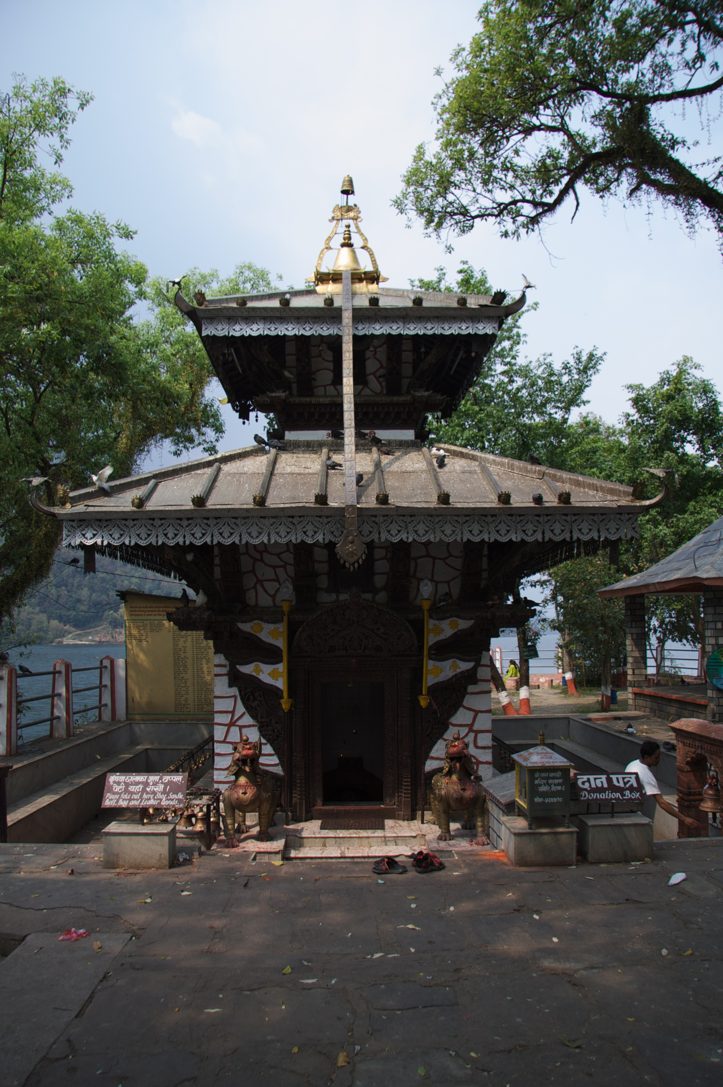 Barahi temple, Phewa lake, Pokhara